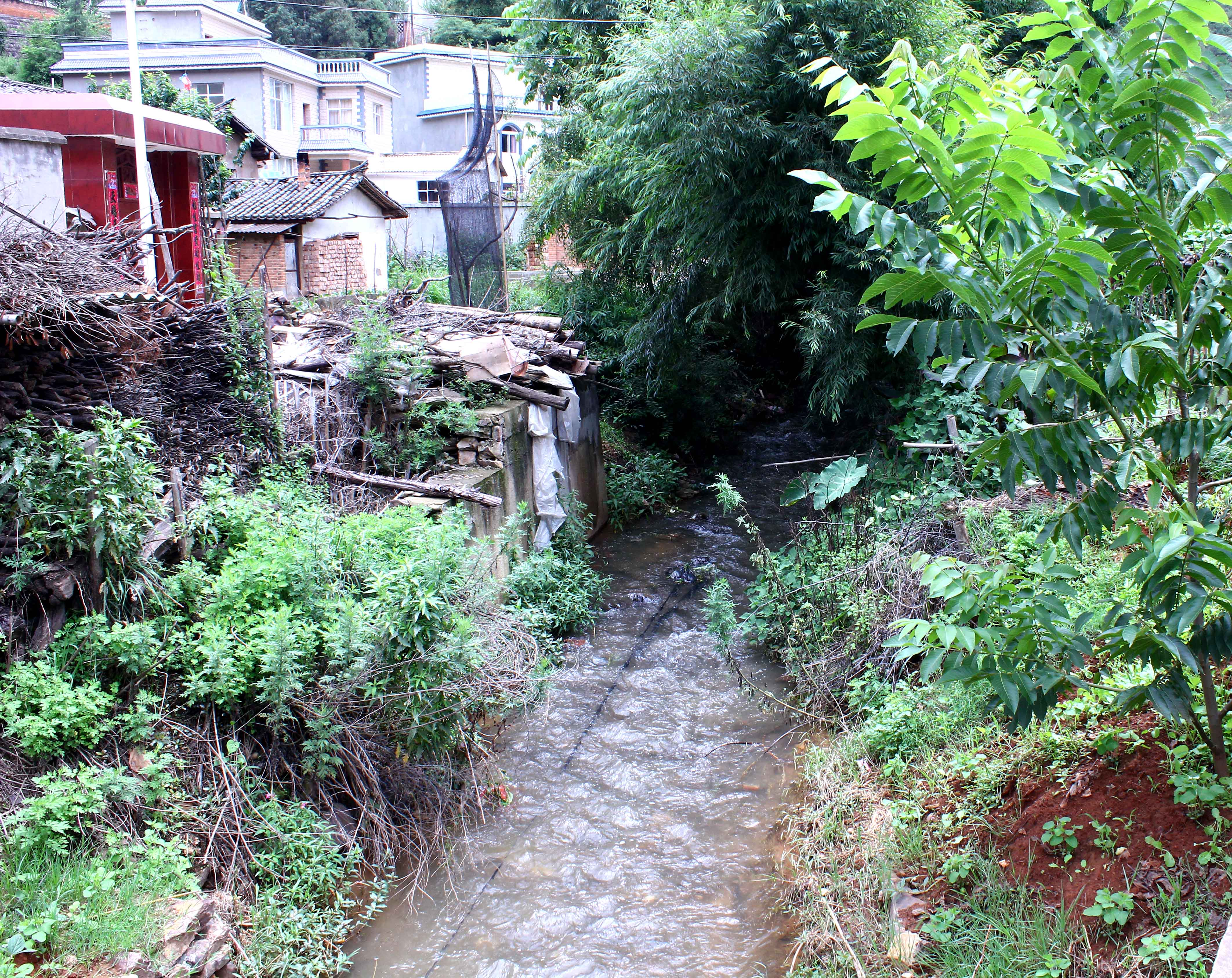 昆明市西山区团结街道律则河，拍摄于律则社区。